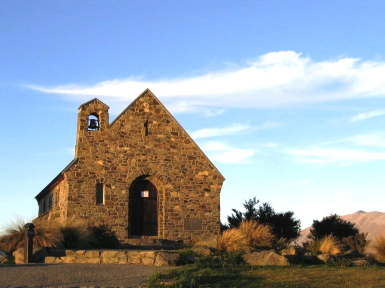 Church of the Good Shepherd